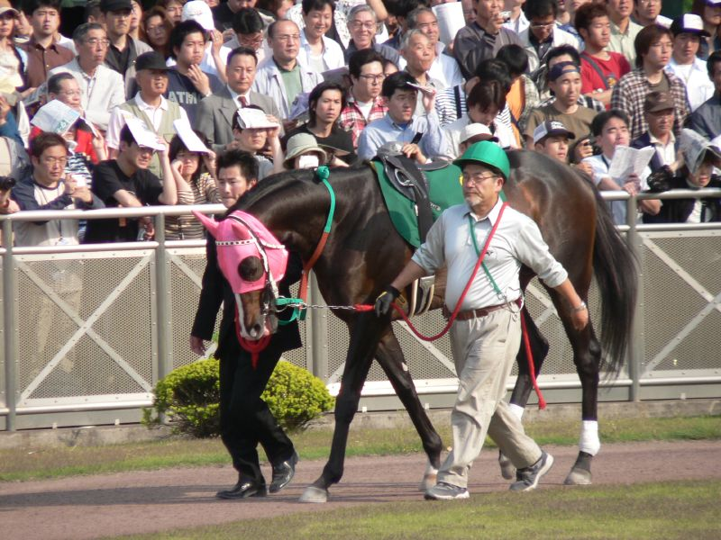 メイショウボーラー（第17回かしわ記念）